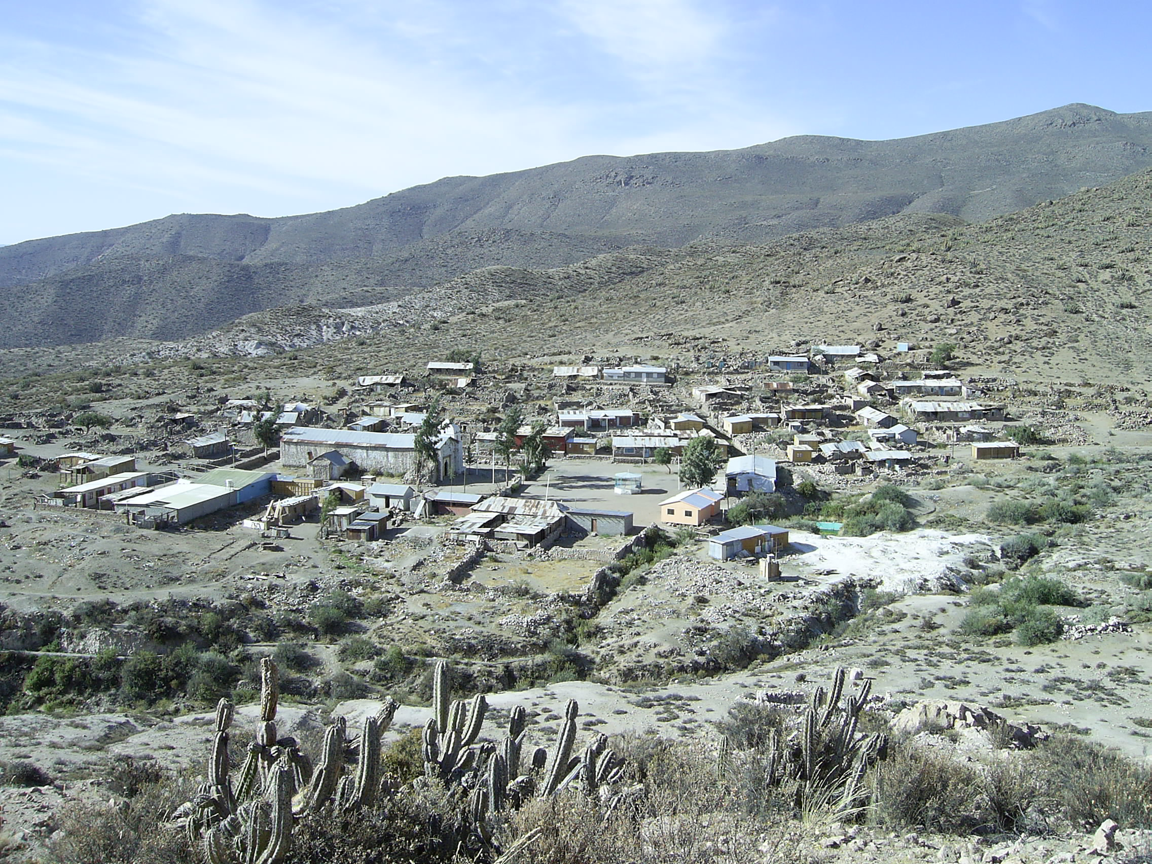 Sotoca, Chile. Vista al norte